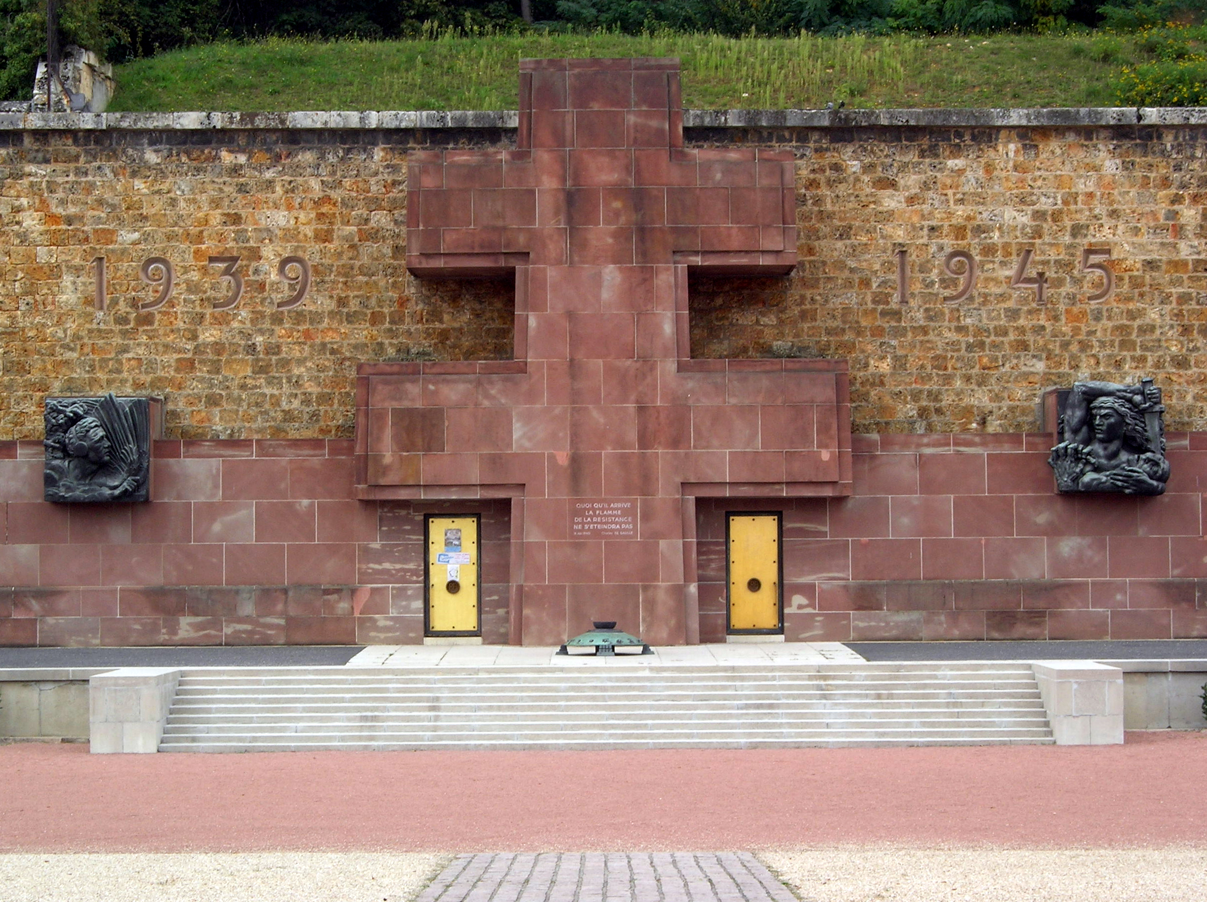 Description = Croix de lorraine au mémorial du Mont-Valérien Source =Photo taken by Remi Jouan Date =Septembre 2006 Author =Remi Jouan